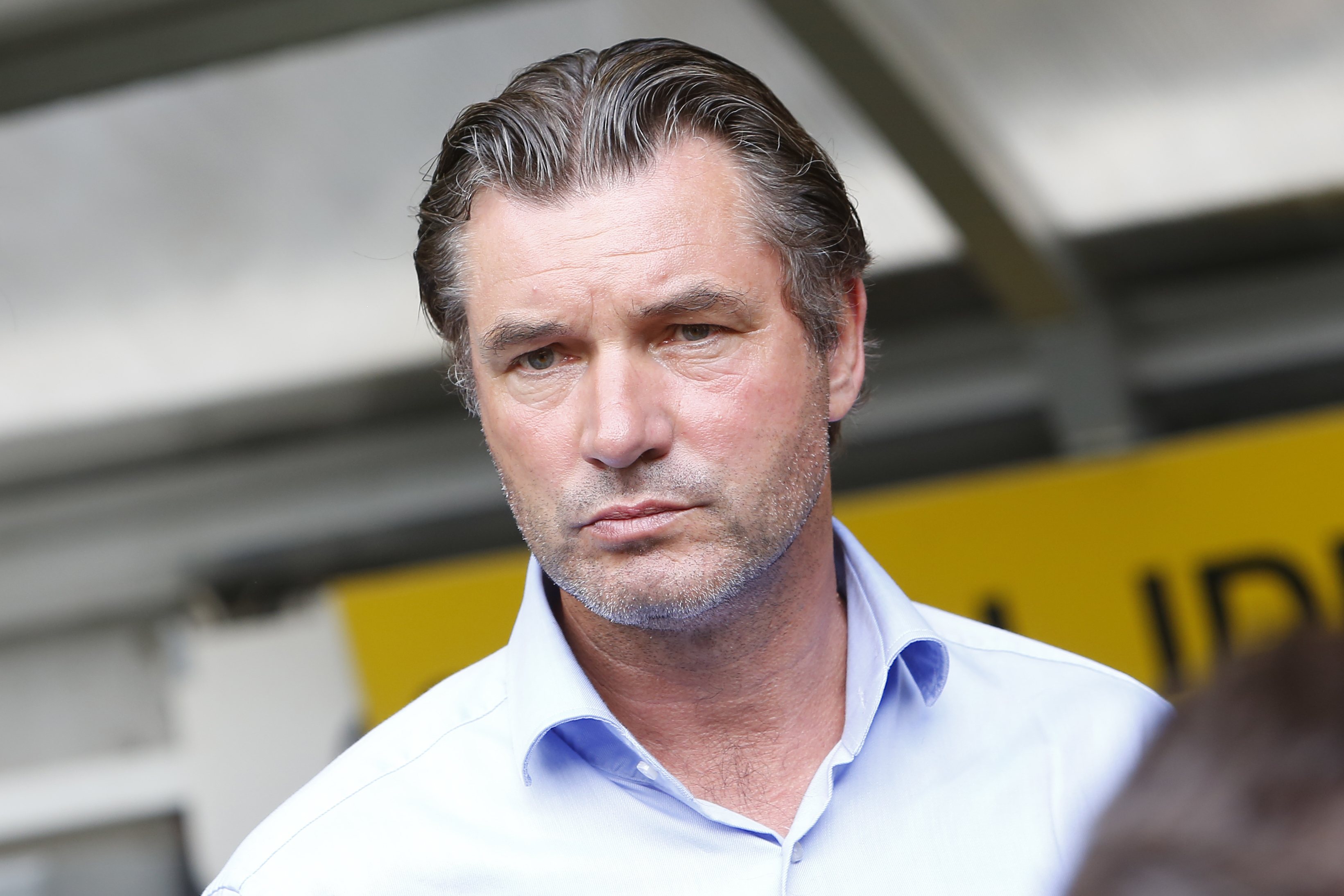 Michael Zorc, Sportdirektor des BV 09 Borussia Dortmund am 09.08.2014 bei der Vorstellung der neuen Mannschaft im Signal Iduna Park